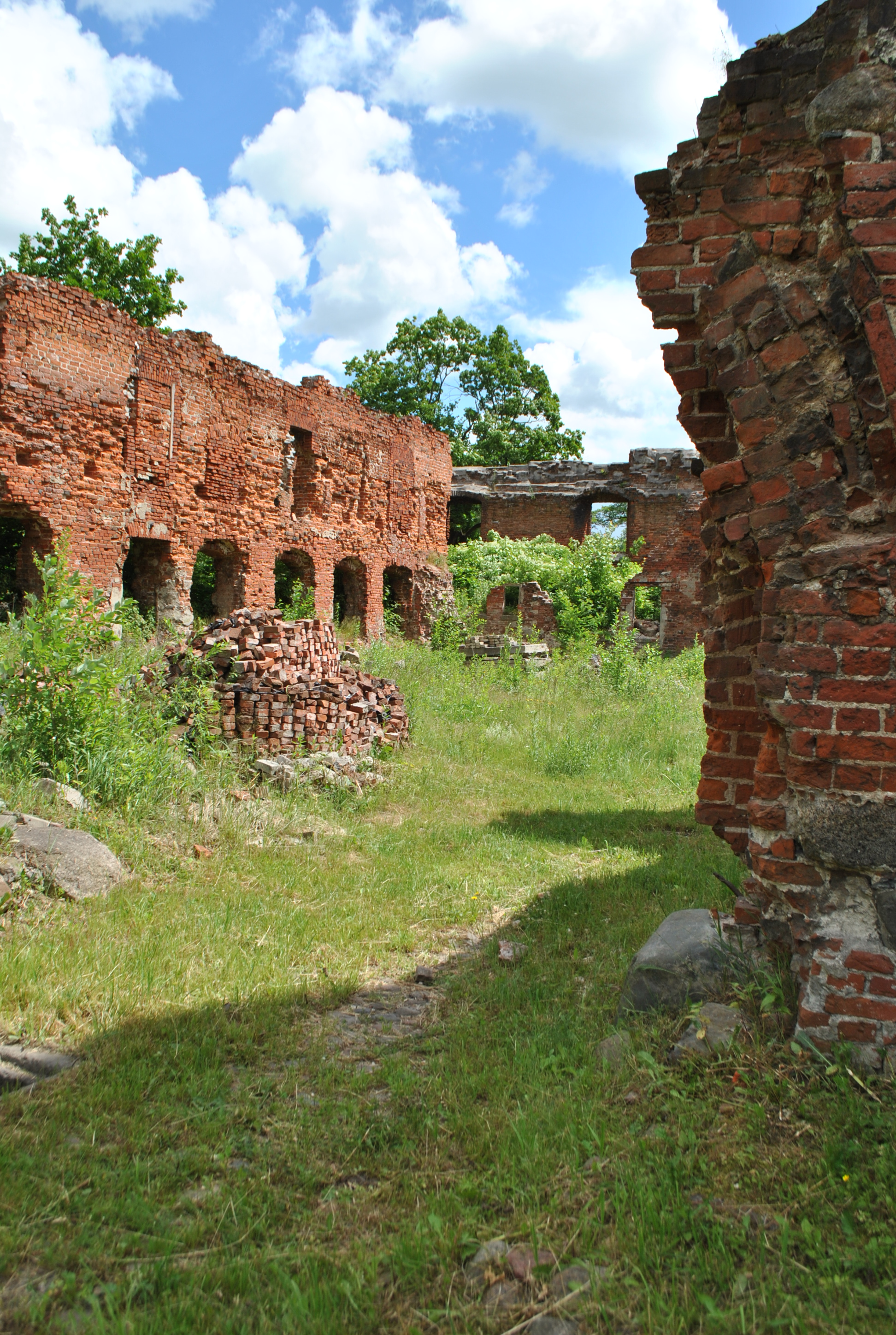 Архитектурный ансамбль Инстербург (замок) (Калиниградская область, Черняховск, город Черняховск)